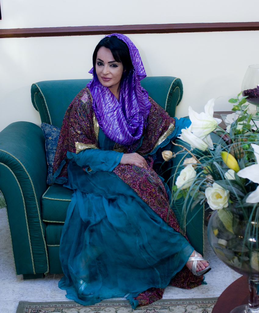 آثناء تصوير مسلسل الحب الكبير